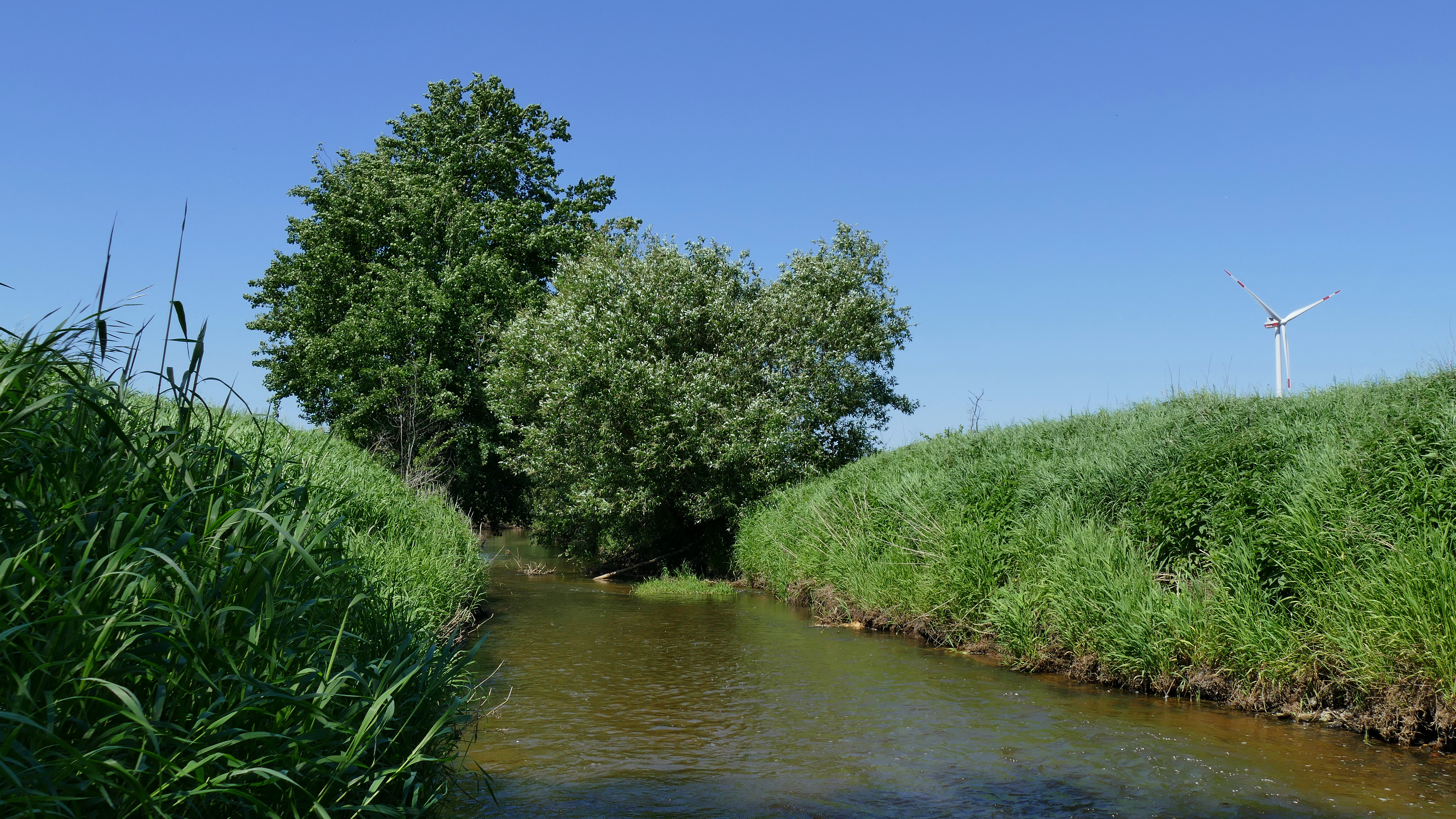 Die Erse mündet nördlich von Uetze in die Fuhse, diese wiederum in Celle in die Aller. Dieser Bach liegt im 2016 erweiterten Landschaftsschutzgebiet „Ersetal“ - LSG-H 47 und wird in seinem gesamten Verlauf in Form des FFH-Gebietes 3427-331 „Erse“ mit einem Puffer von 25 m beiderseits der Flussmitte geschützt.